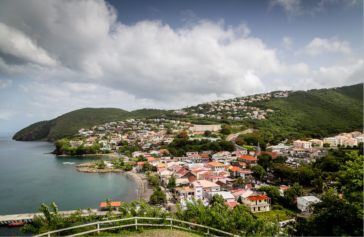 Baie de Case-Pilote